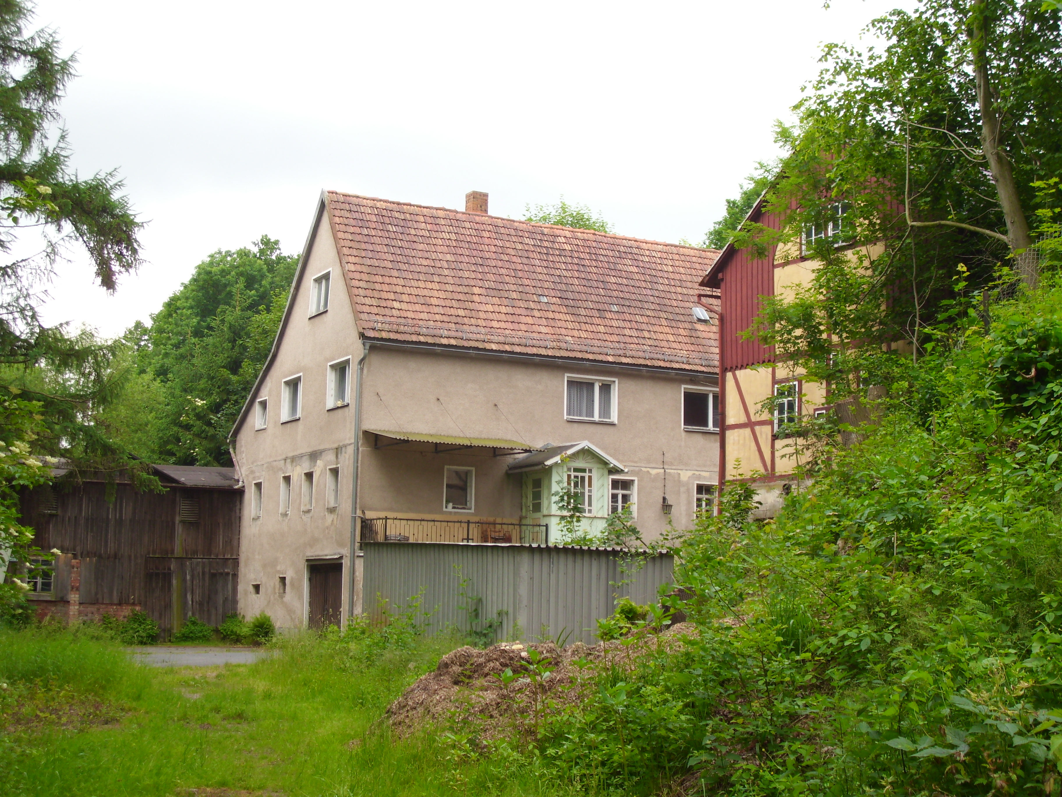 Die Lübauer Mühle liegt am Oberen Ende des Lübauer Gründel am Borlasbach in Lübau.